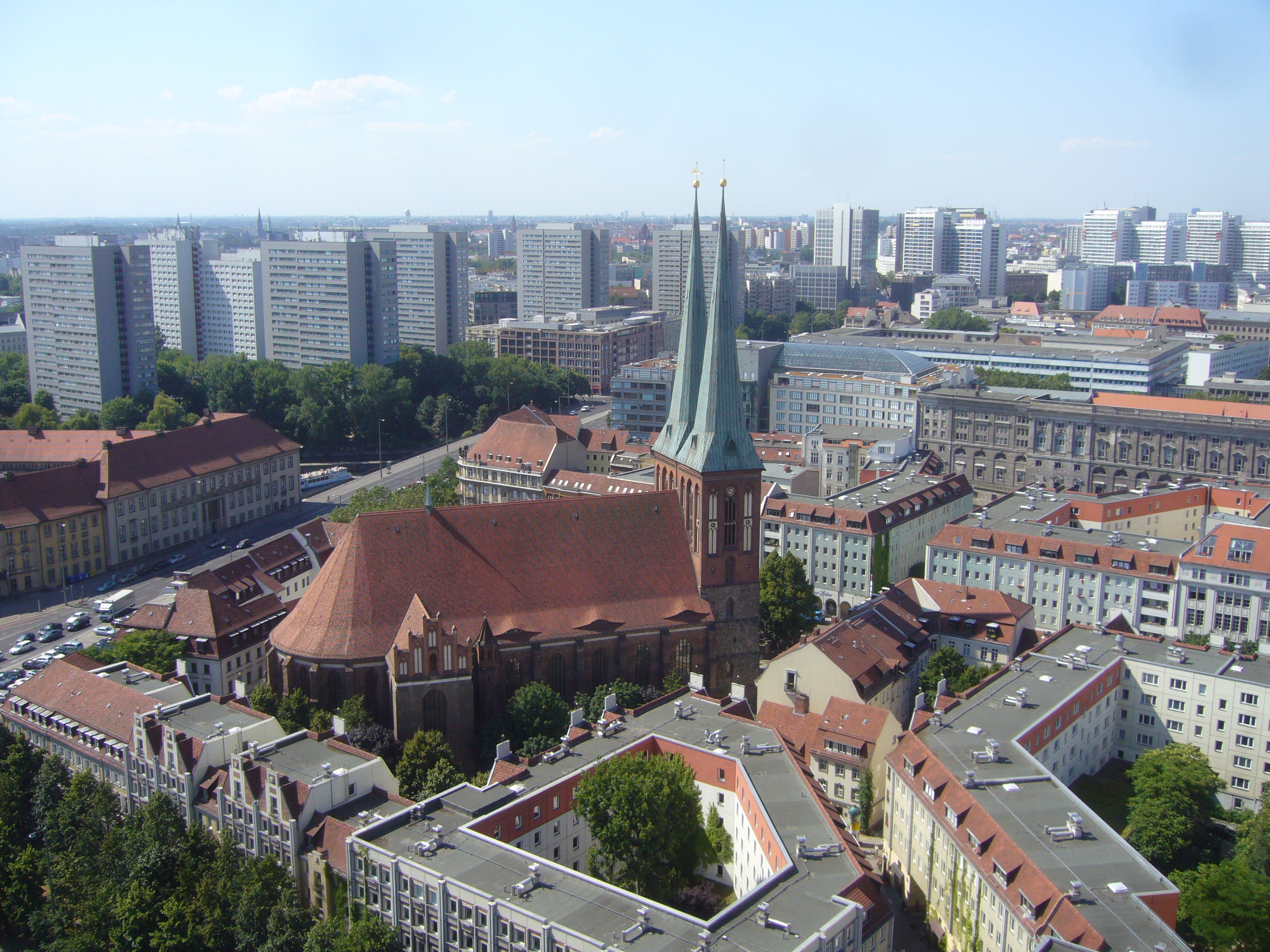 Die Nikolaikirche (Stadtmuseum Berlin) in Berlin-Mitte, vom Rathausturm gesehen